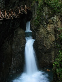 Sigmund-Thun-szurdok, Kaprun, Ausztria